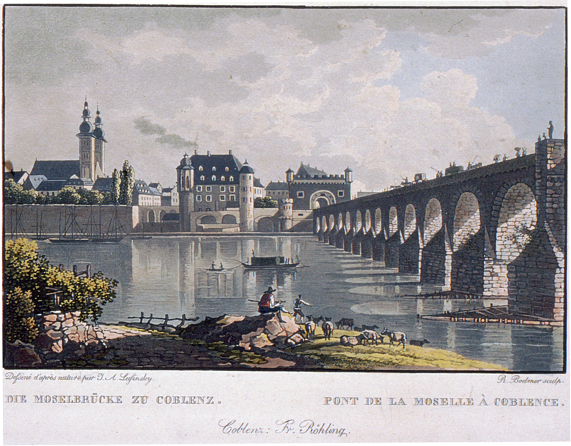 Blick auf die Alte Moselbrücke Alkolorierter Aquatinta-Stich von R.Bodmer nach Vorlage von J.A. Lasinsky um 1830